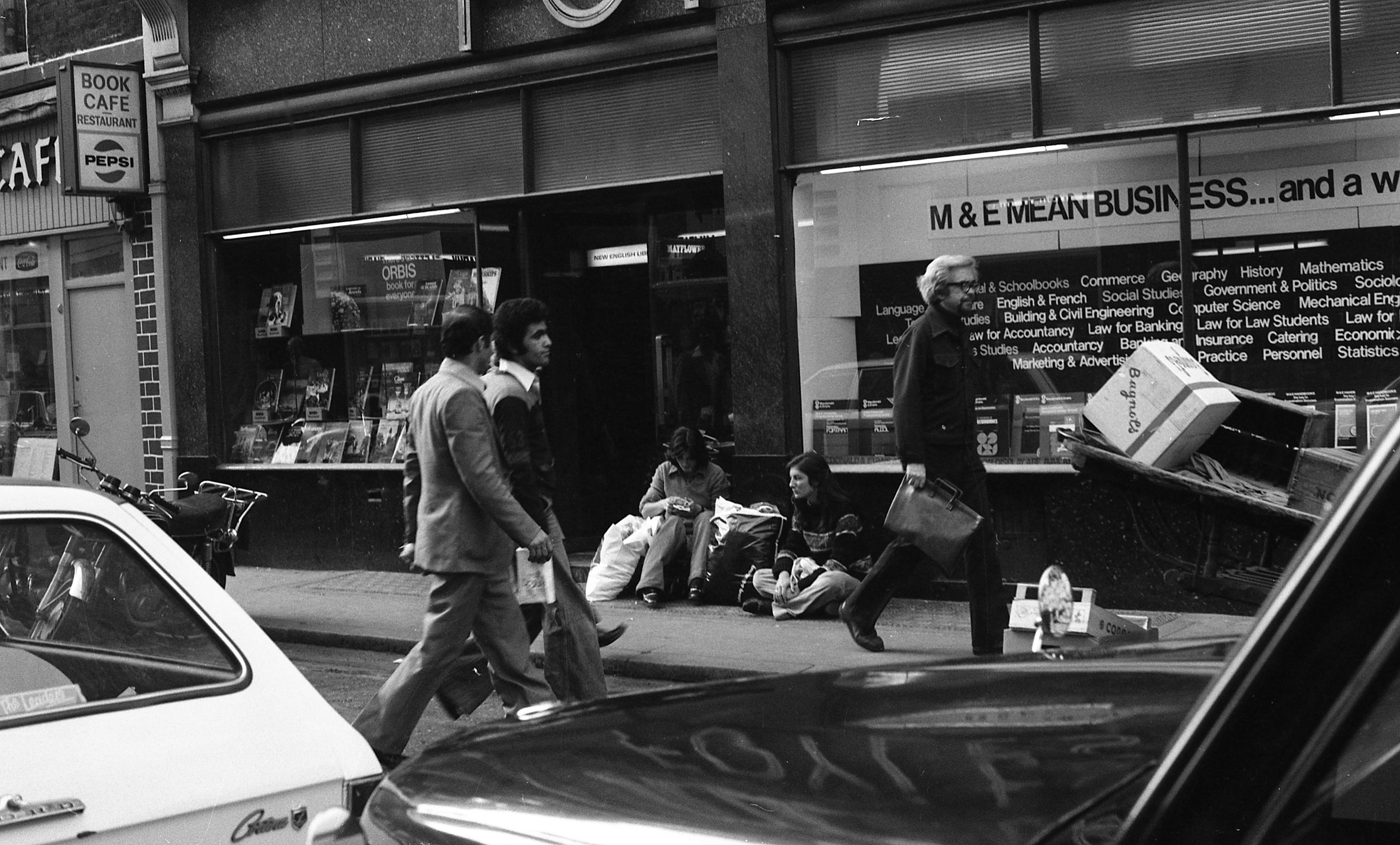 Manette Street. Location: United Kingdom Title: Manette Street.